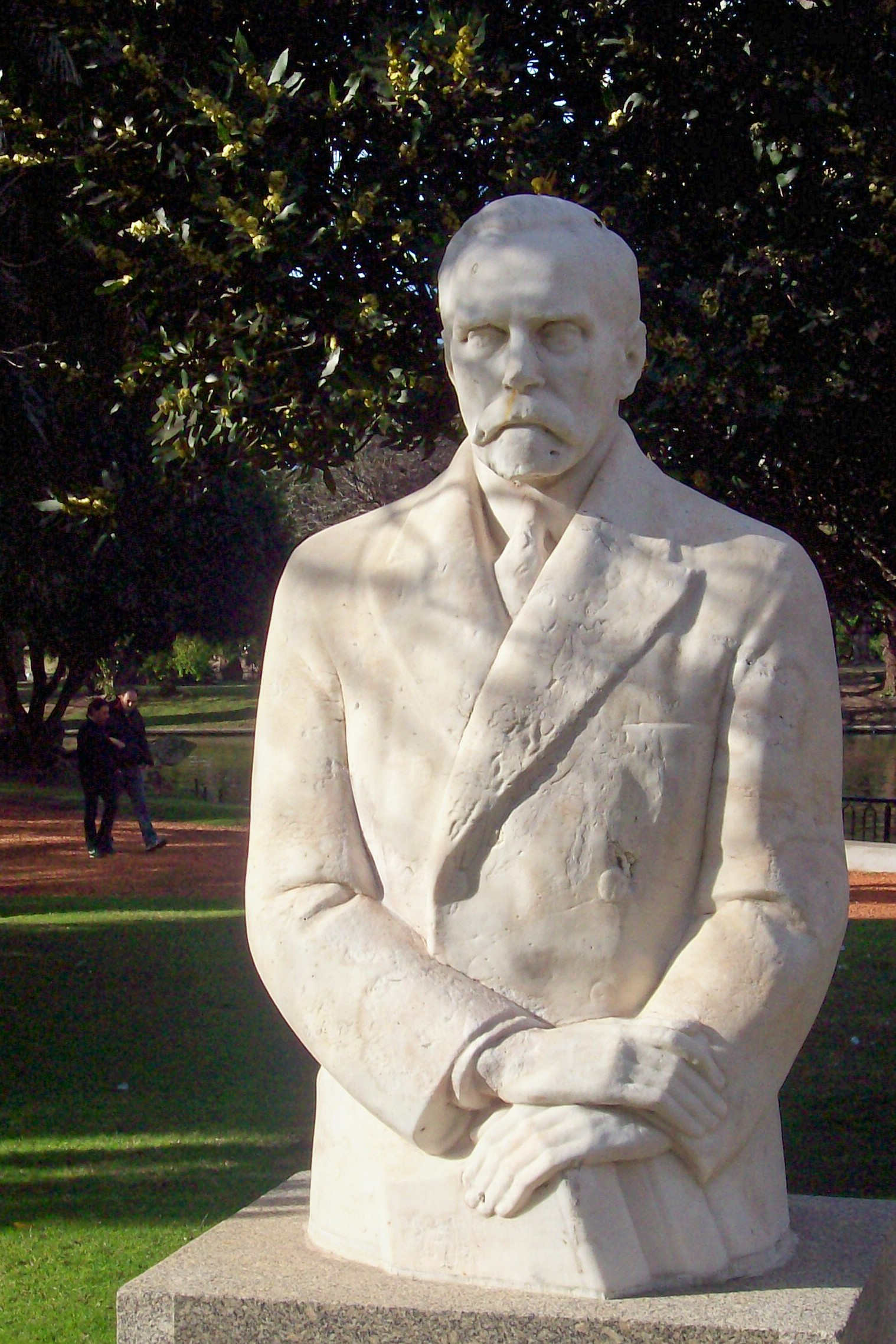 Monumento al escritor franco-argentino Paul Groussac en los Parques de Palermo.